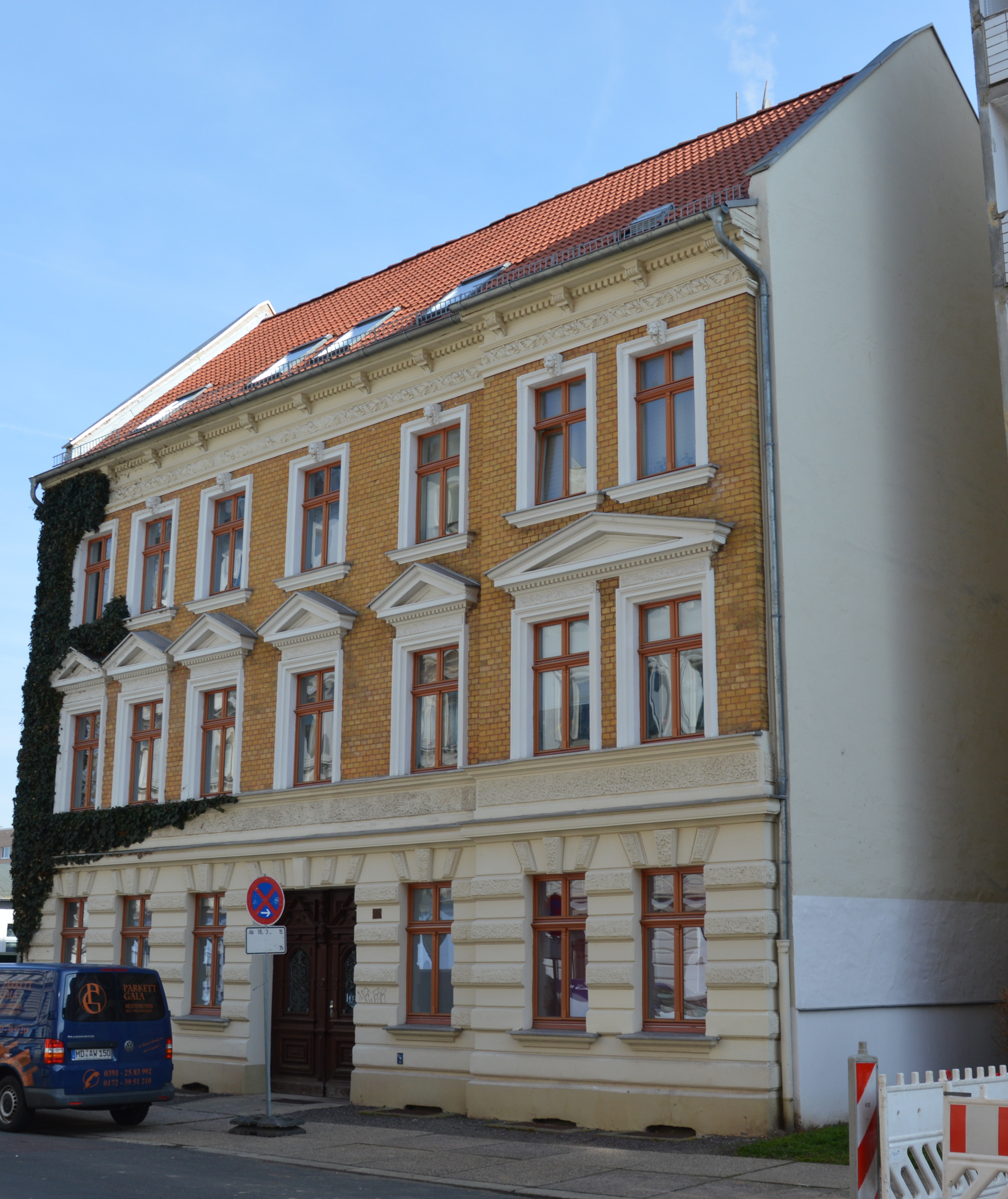 Haus Abendstraße 12 in Magdeburg